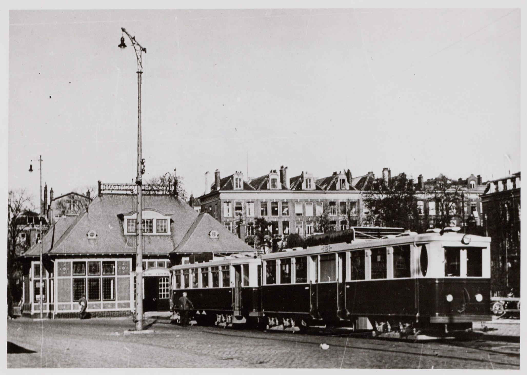 Beschrijving Station van de Gooische Tramweg Maatschappij met de gelijknamige tram, Rhijnspoorplein Documenttype foto Vervaardiger Onbekend Anoniem Collectie Collectie Stadsarchief Amsterdam: foto-afdrukken Datering 1936 ca. Geografische naam Rhijnspoorplein Inventarissen Afbeeldingsbestand OSIM00004001674